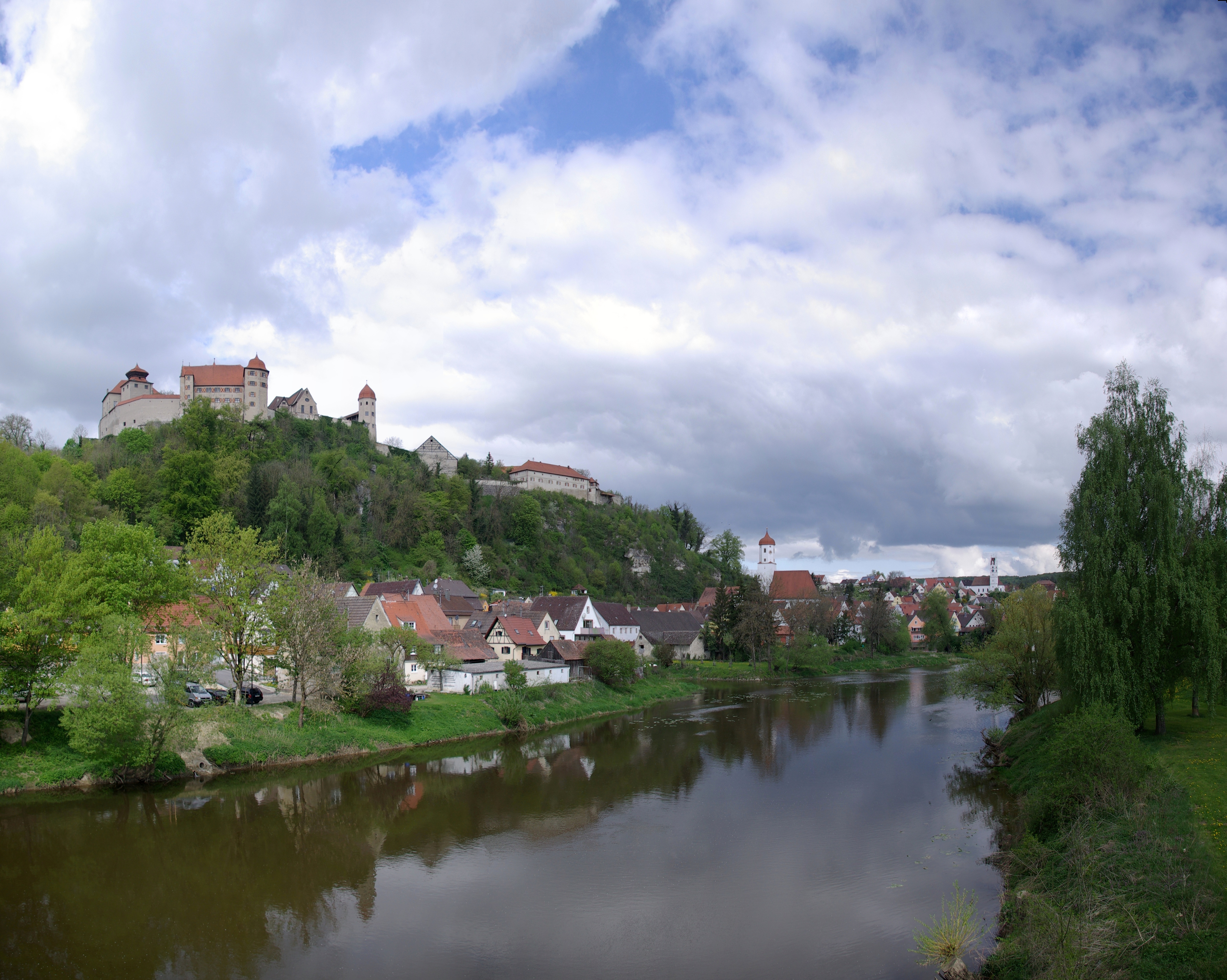 Harbug (Schwaben) Panorama